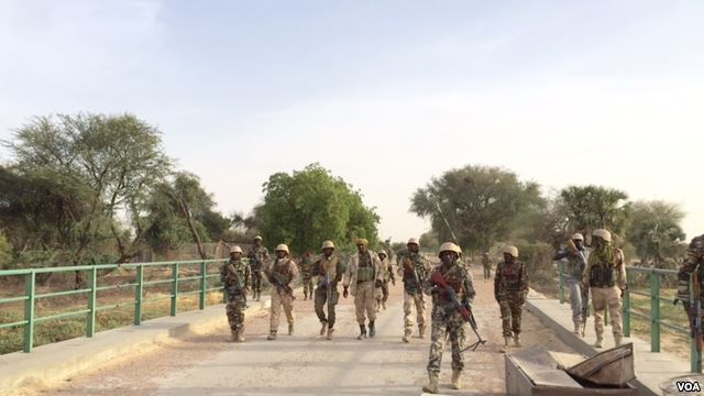 Des militaires nigériens sur le pont de Doutchi en mars 2015. Ce pont qui enjambe la Komadougou est la frontière entre le Niger et le Nigéria et à cette date la ligne de front des attaques de Boko Haram.